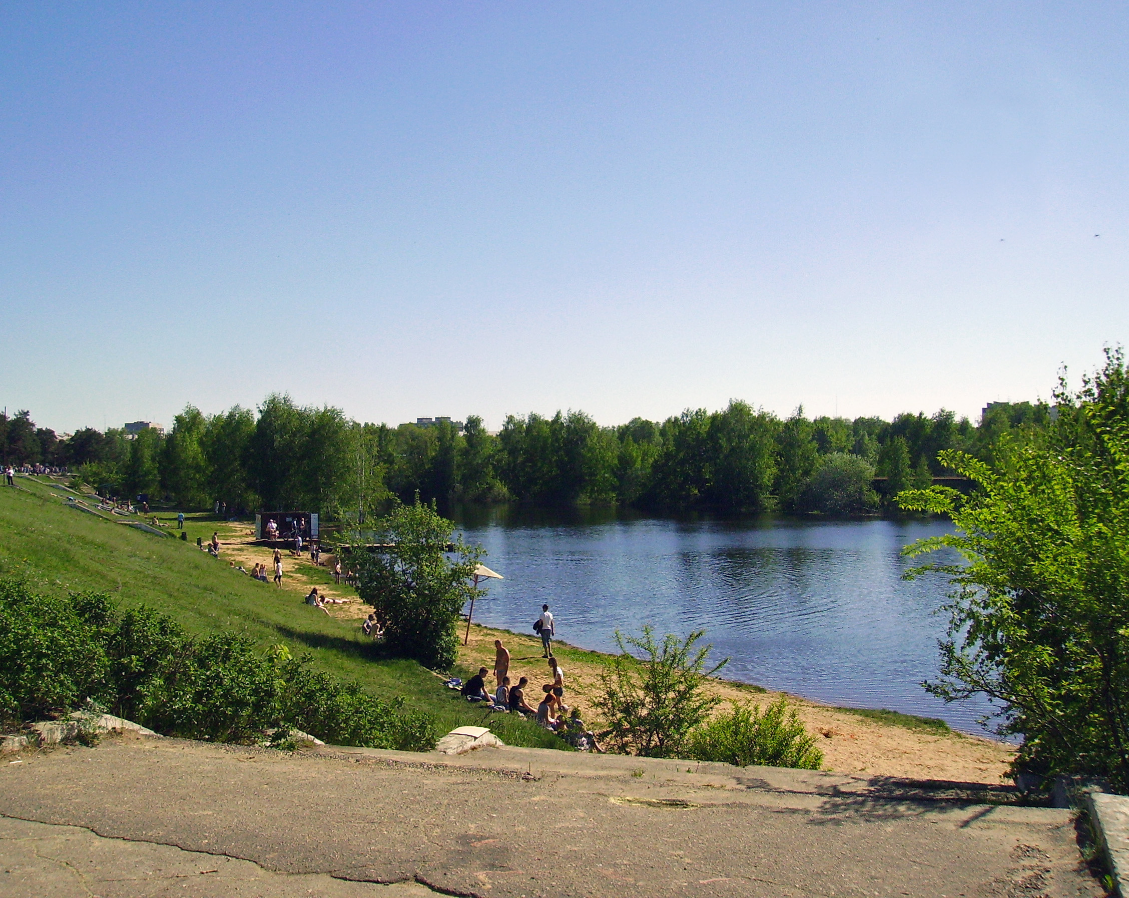 Нижний Новгород. Озеро в Сормовском парке